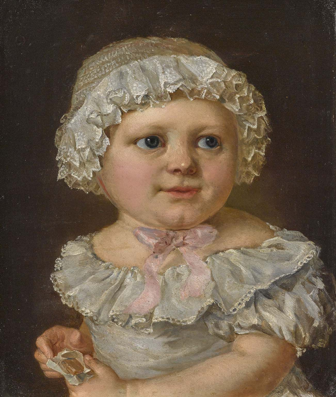 Bildnis eines kleinen Mädchens, ein Bonbon auswickelnd. Öl auf Zinkplatte. 27 x 23,5 cm; deutsch, um 1830